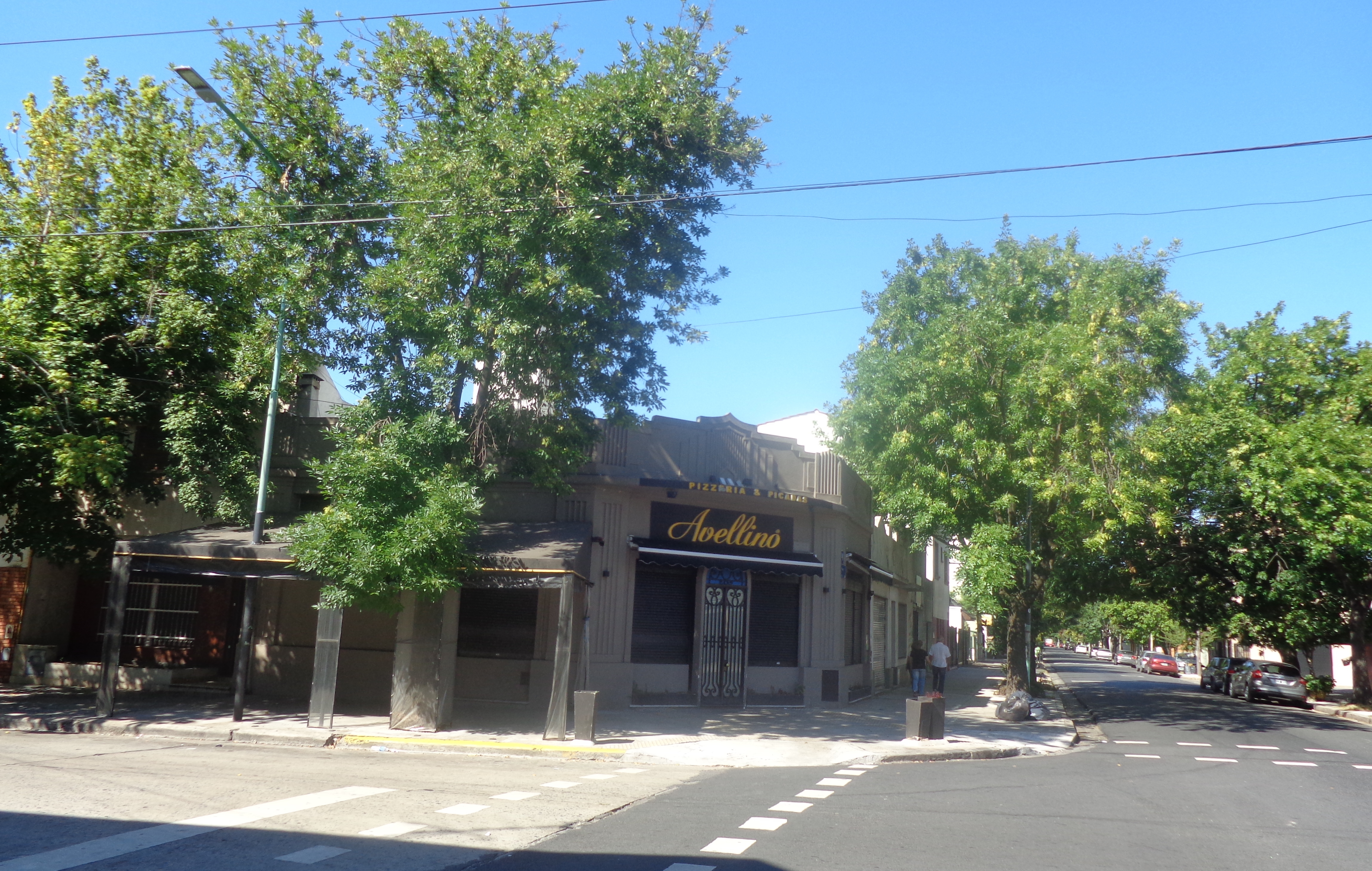 En este bar transcurre parte de la película argentina "El hijo de la Novia", en Nogoyá y Gallardo, Barrio de Versalles, Ciudad de Buenos Aires, Argentina.